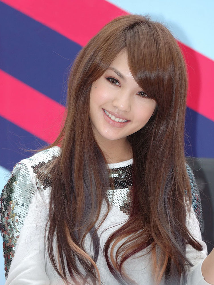 楊丞琳 Nokia X6 代言Bân-lâm-gú: Iûⁿ Sêng-lîm(楊丞琳) tam-jīm Nokia X6 ê tāi-giân-jîn